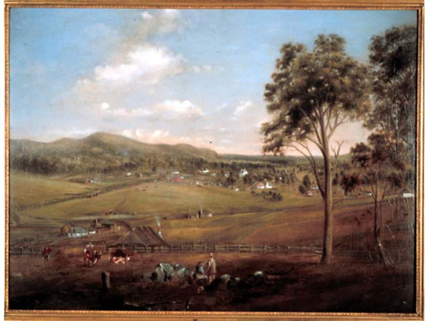 Landscape